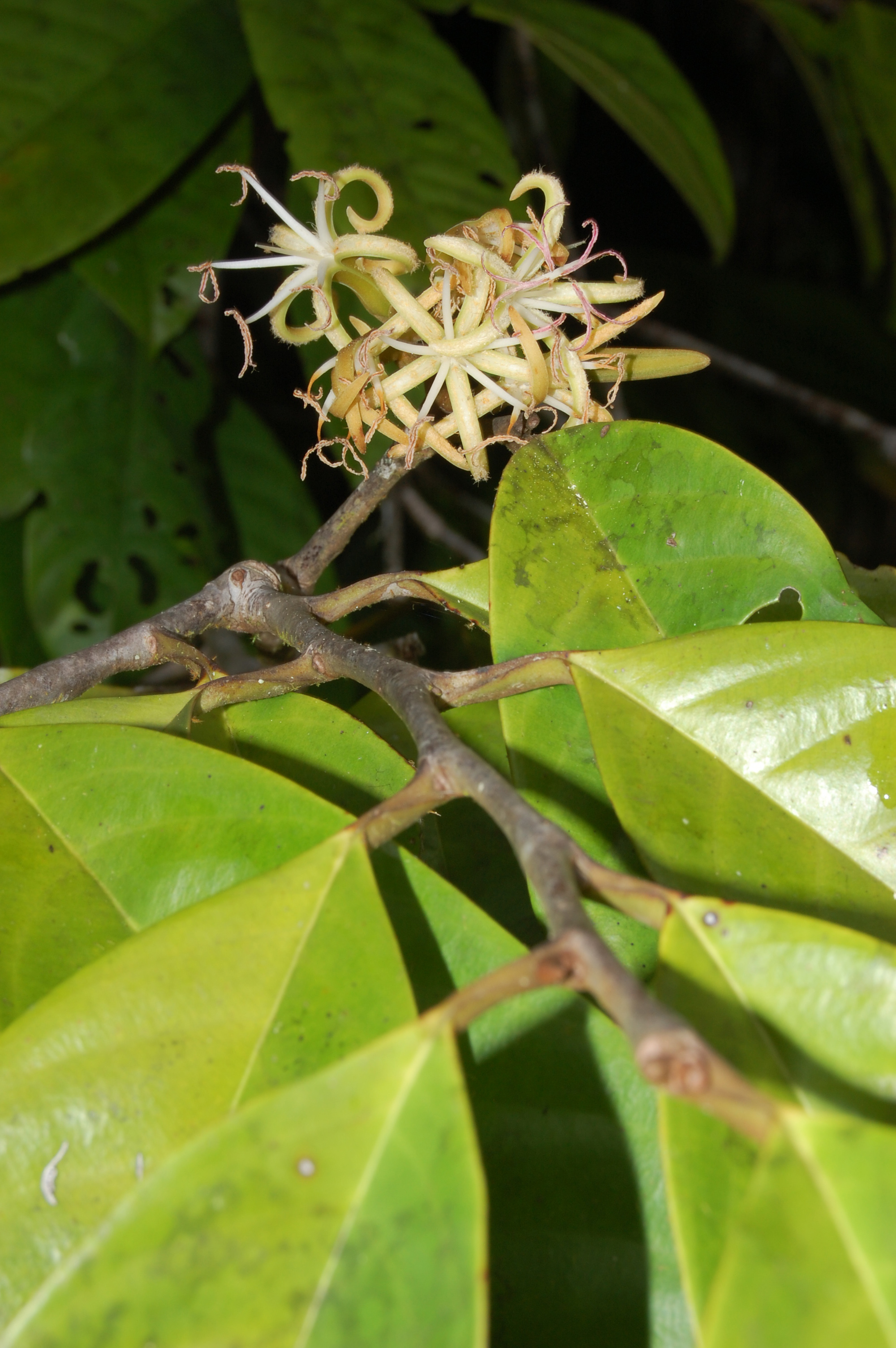 Manual de Plantas de Costa Rica: Testigo Hammel et al. 24665